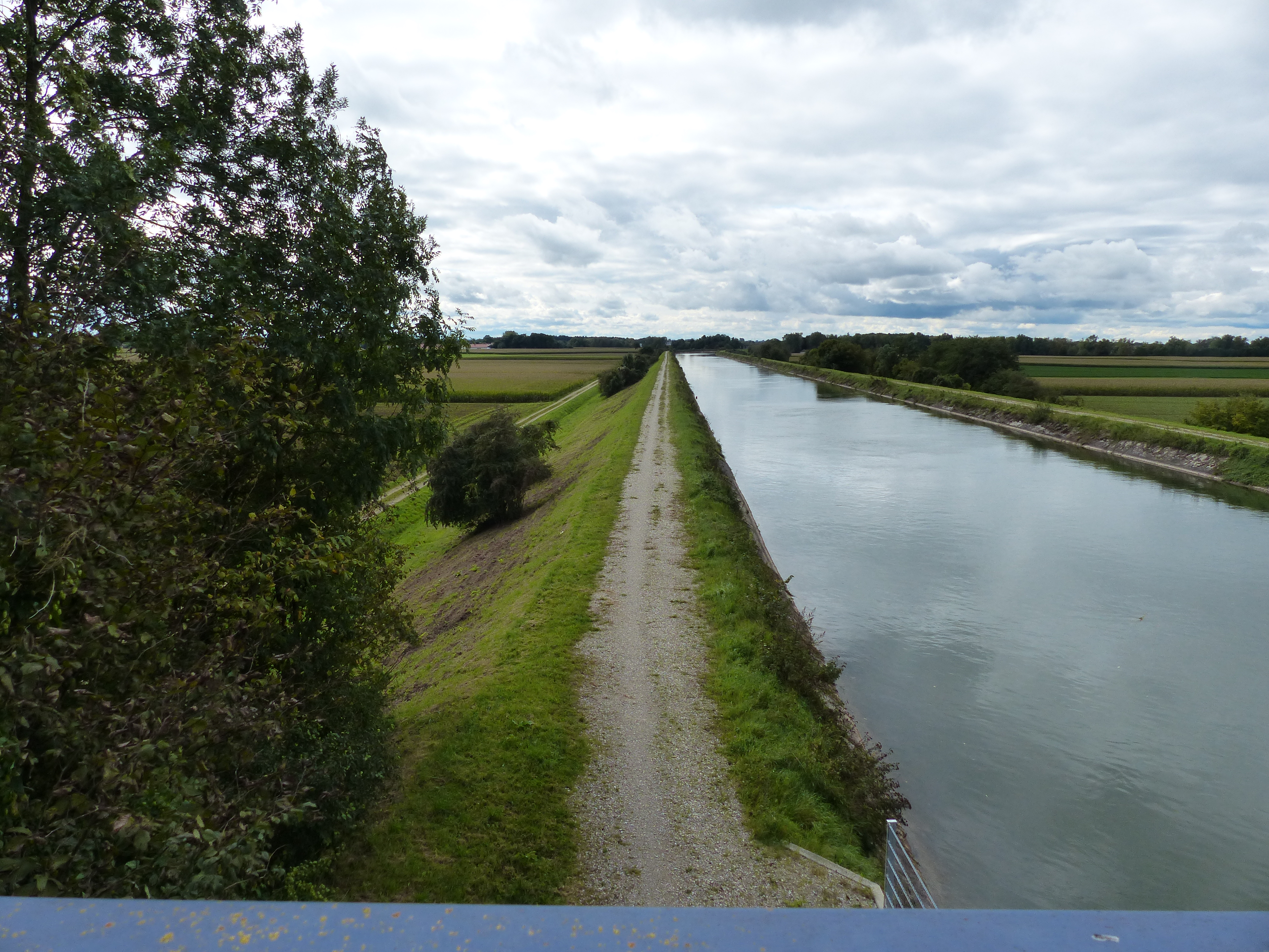 Isarkanal bei Wartenberg, stromaufwärts